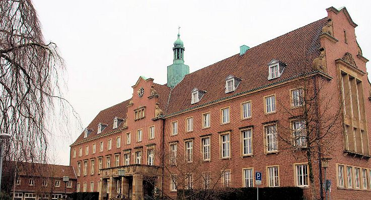 Nordhorn, Rathaus, Bahnhofstraße Farb- und Ausschnittkorrektur eines bereits hochgeladenen Bildes.